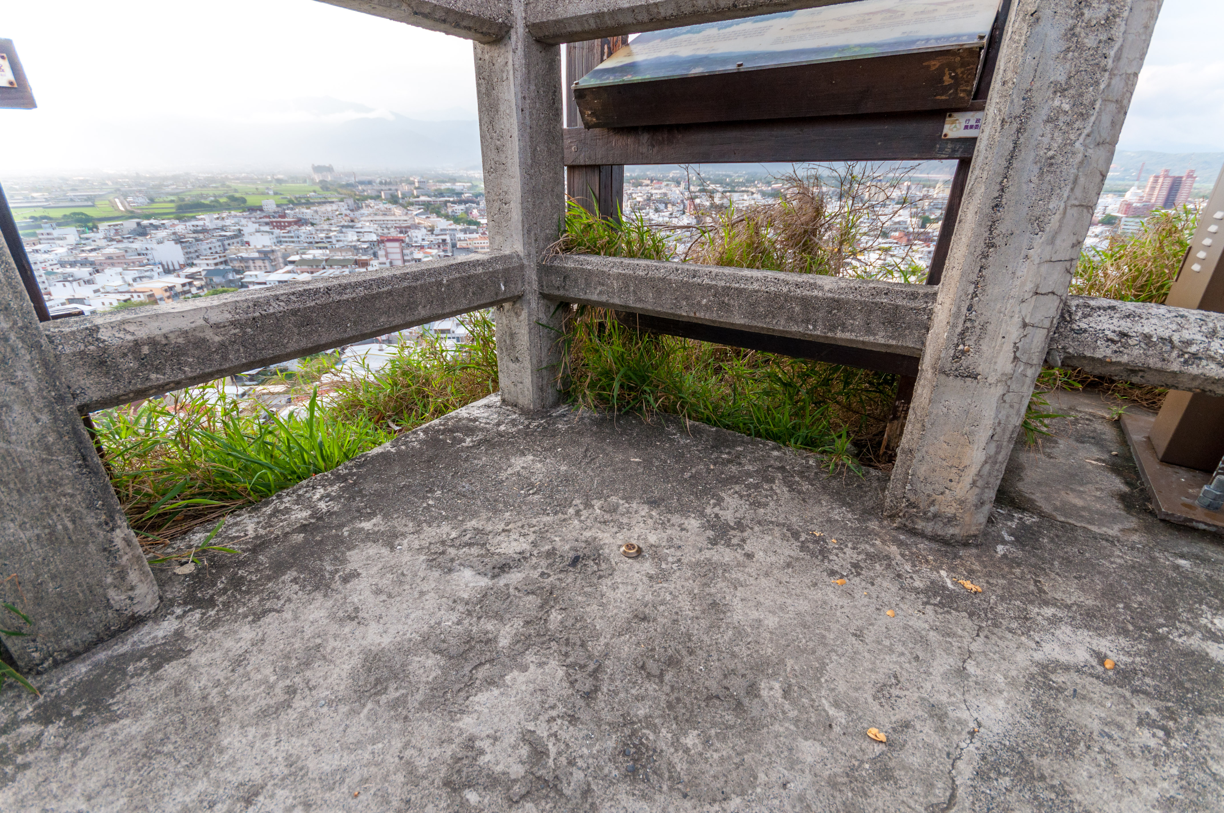 台東鯉魚山鯉首觀景平台上的台東縣政府圖根點